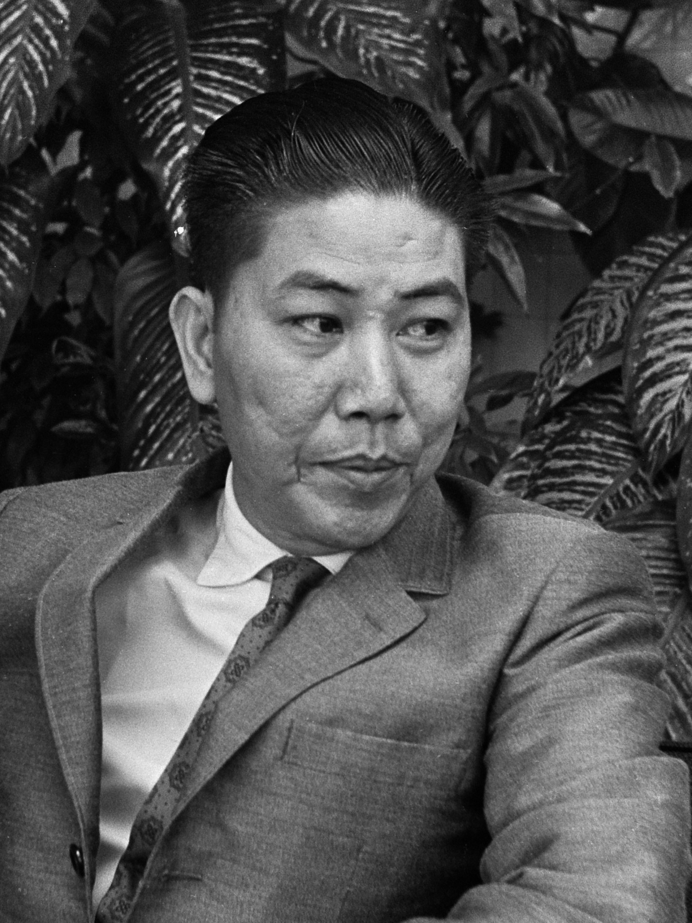 Aankomst Zuid-Vietnamese parlementaire delegatie op Schip Nguyen Ba Can , leider delegatie 12 juli 1968